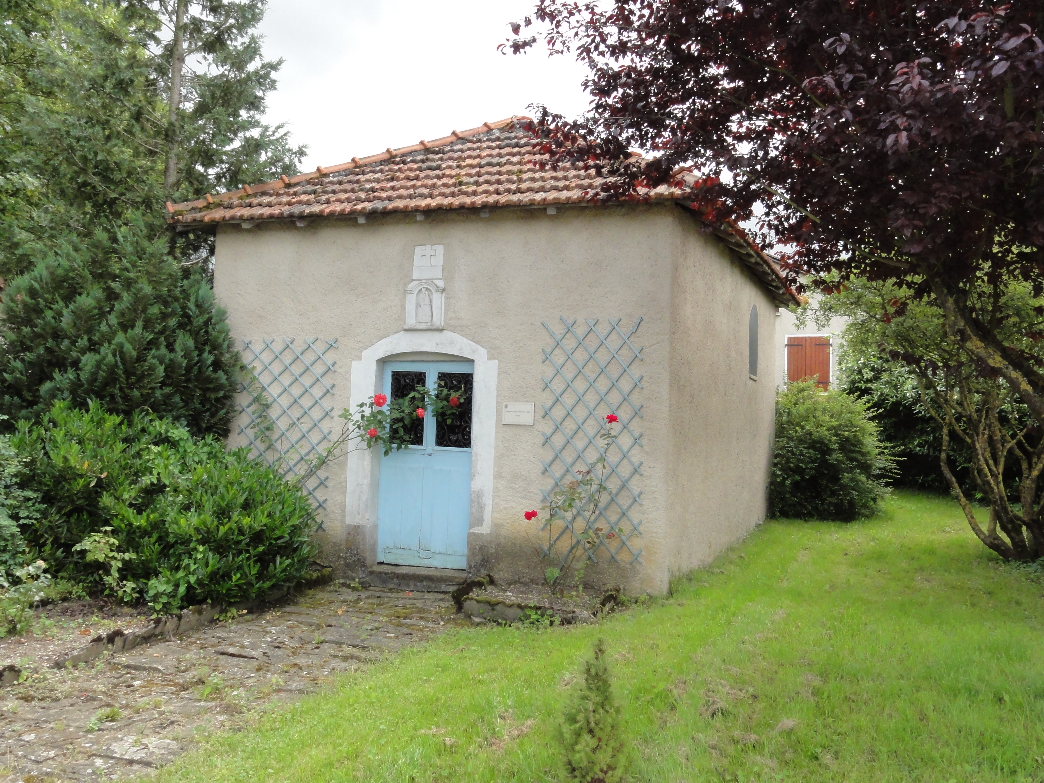 Lemainville (M-et-M) chapelle Notre-Dame-des- Anges